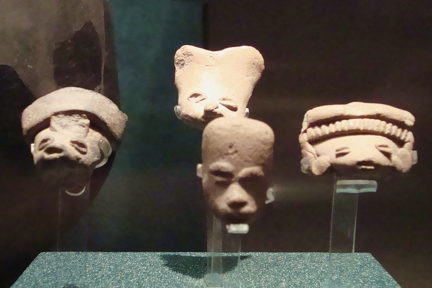 Figurillas de cerámica, fechadas en las primeras fases de Teotihuacan. Preclásico Tardío mesoamericano. Forman parte de la colección del Museo Nacional de Antropología (México).